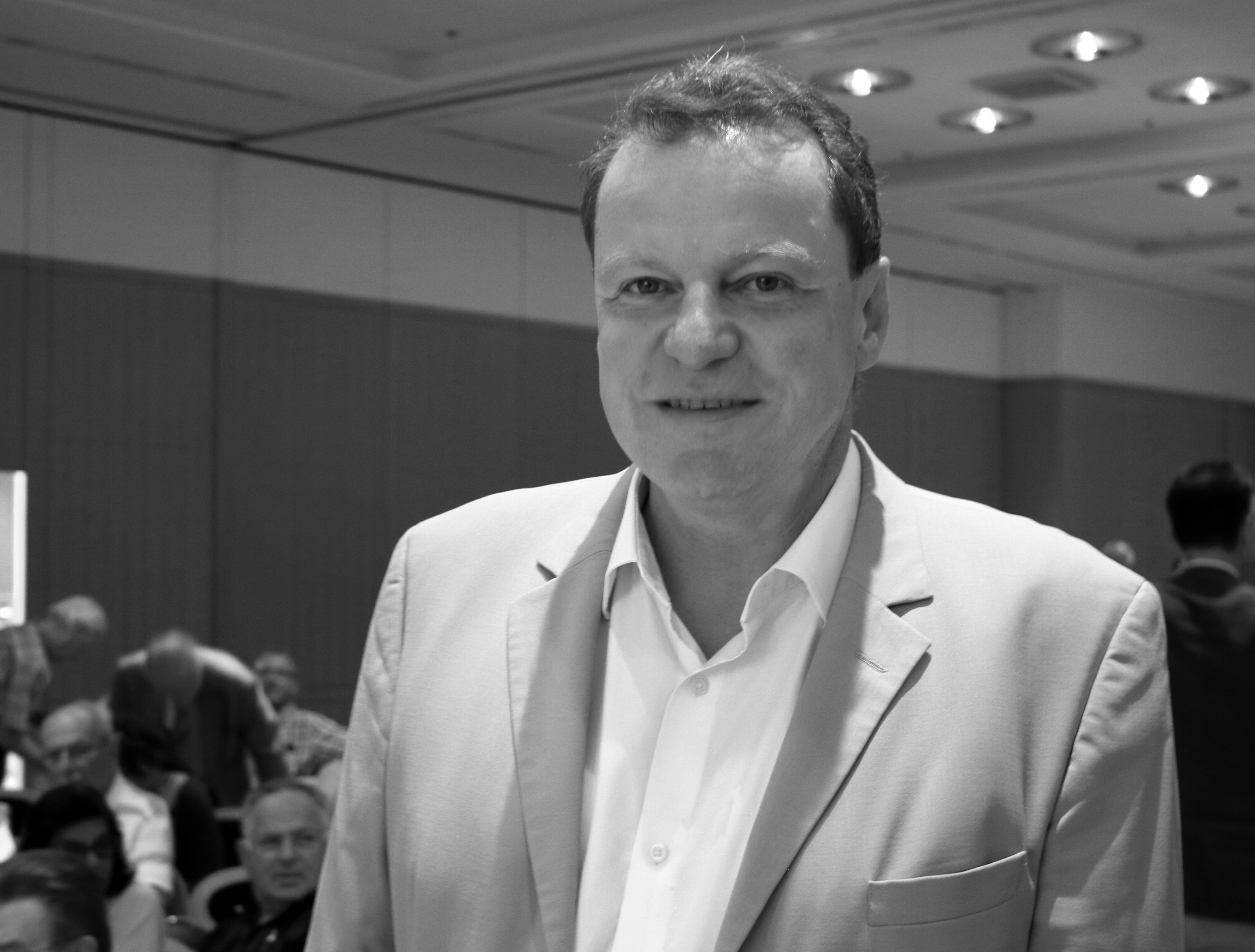 Franz-Georg Strauß, 2015 in der Hanns-Seidl-Stiftung, München